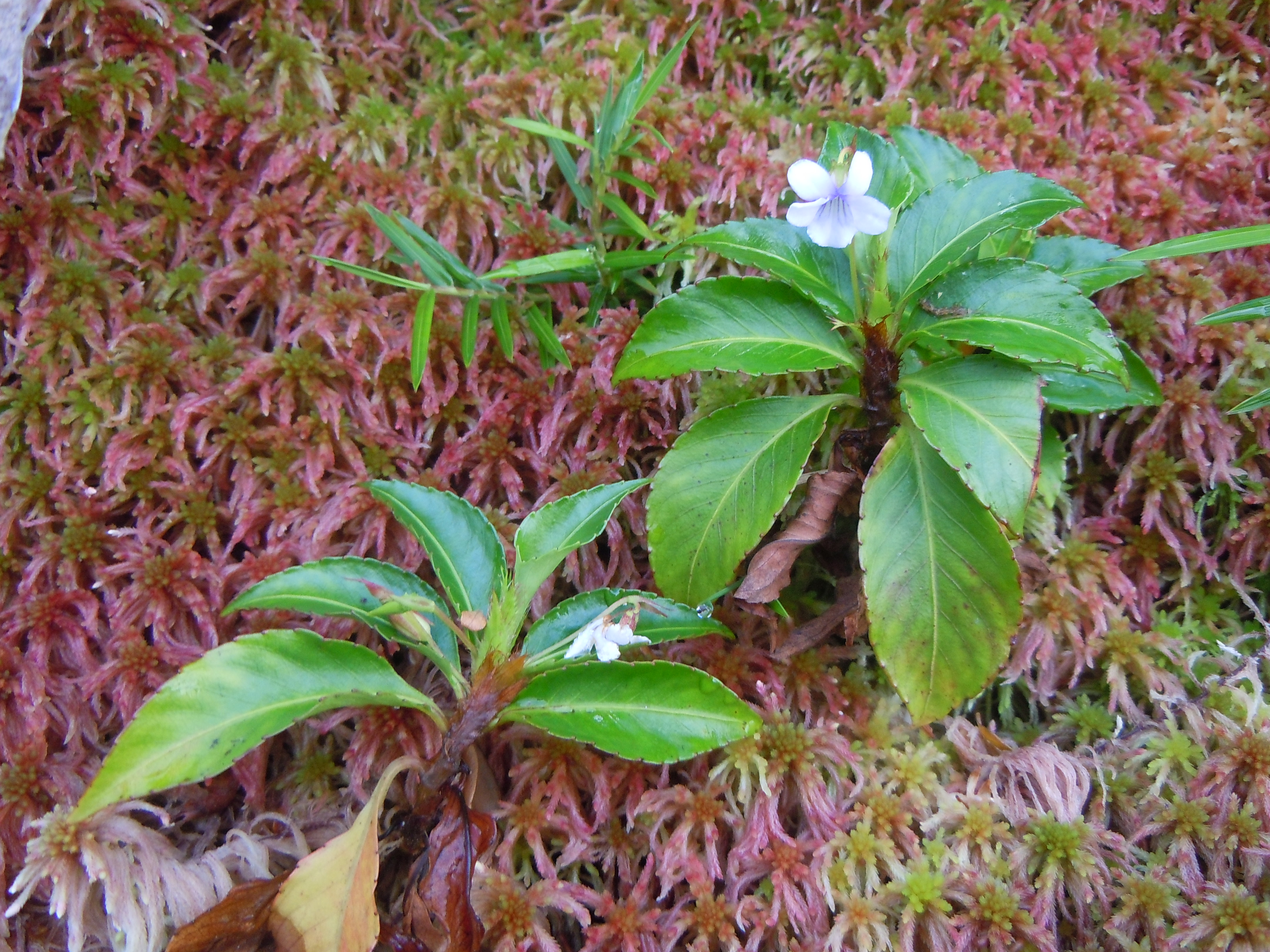 Viola stipularis-La Soufrière-Guadeloupe